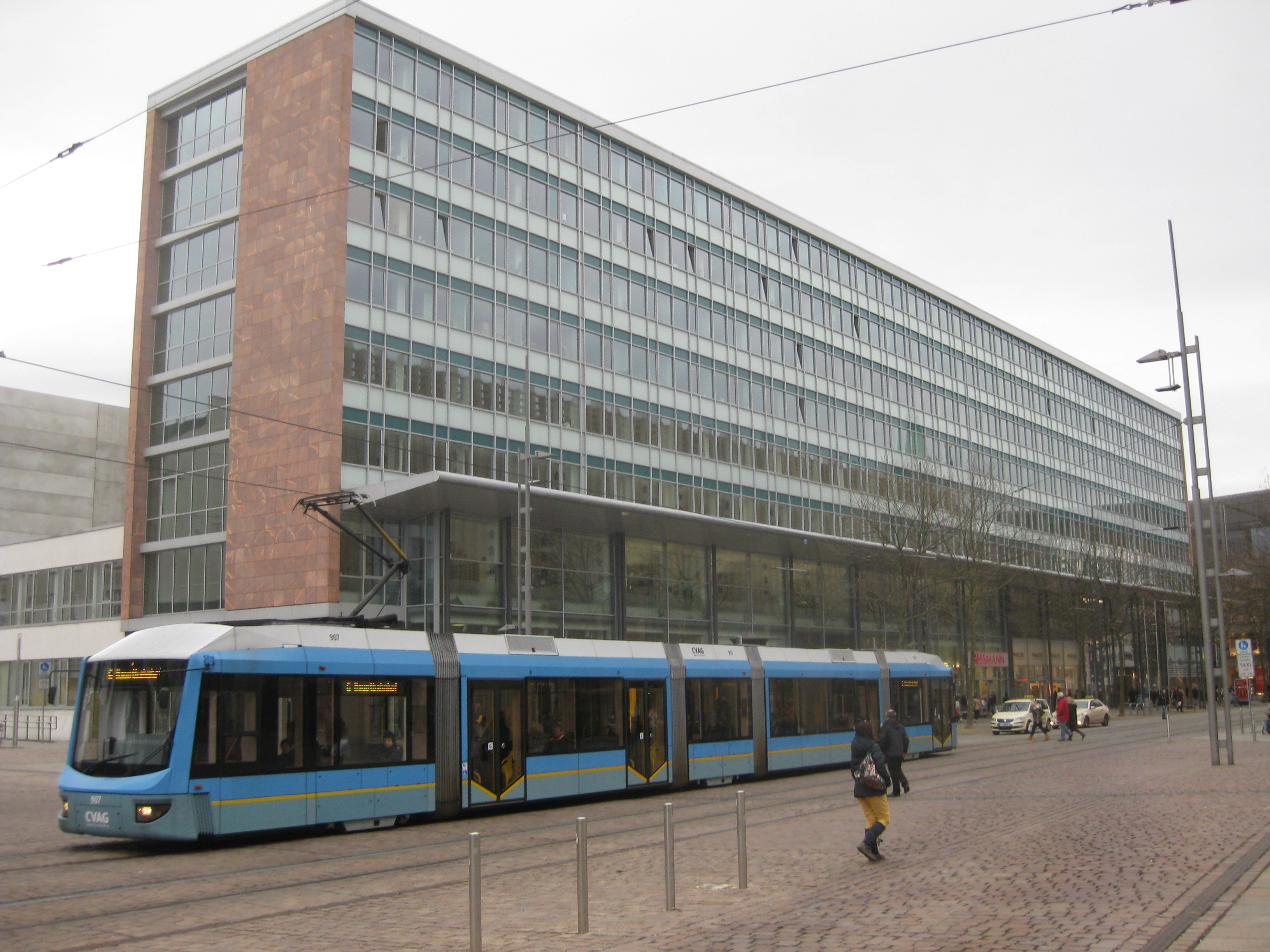 Denkmalgeschütztes Hauptpostamt in Chemnitz-Zentrum